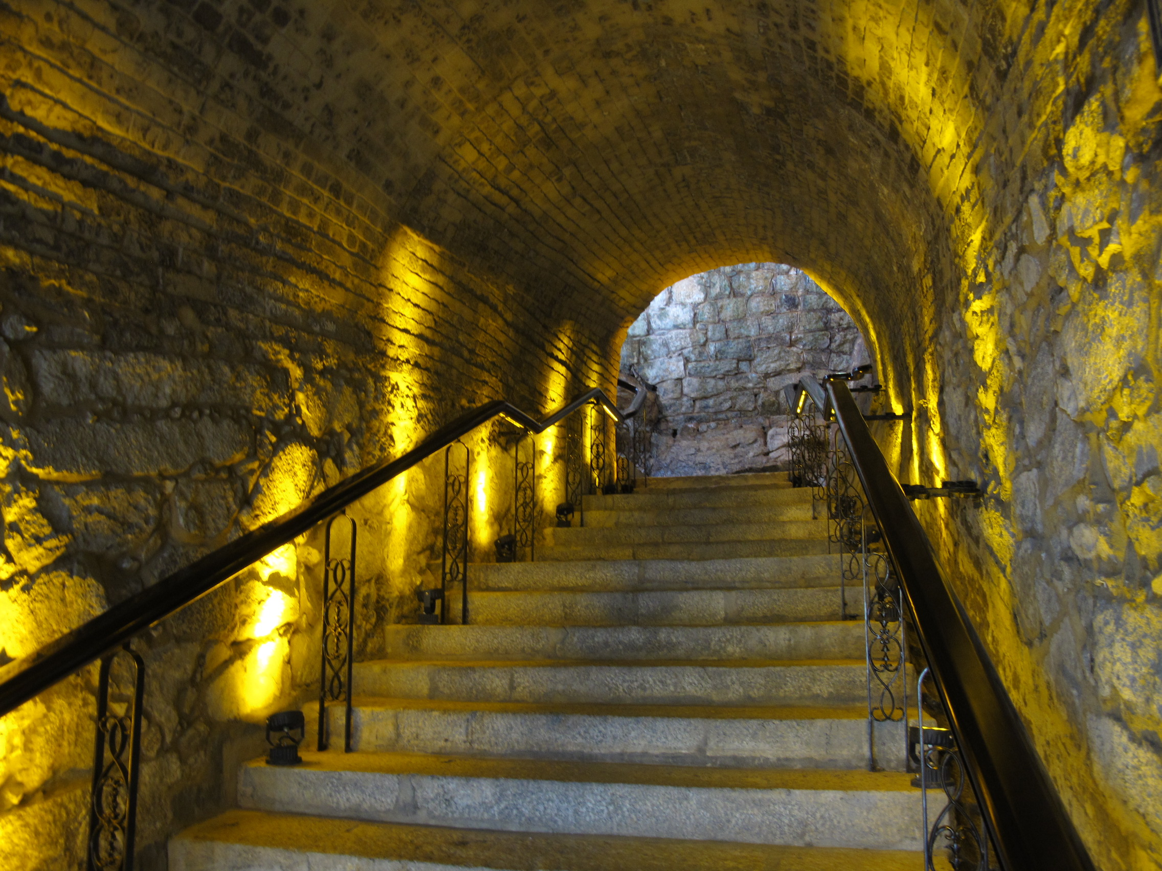 Pousada de São Tiago Entrance Tunnel